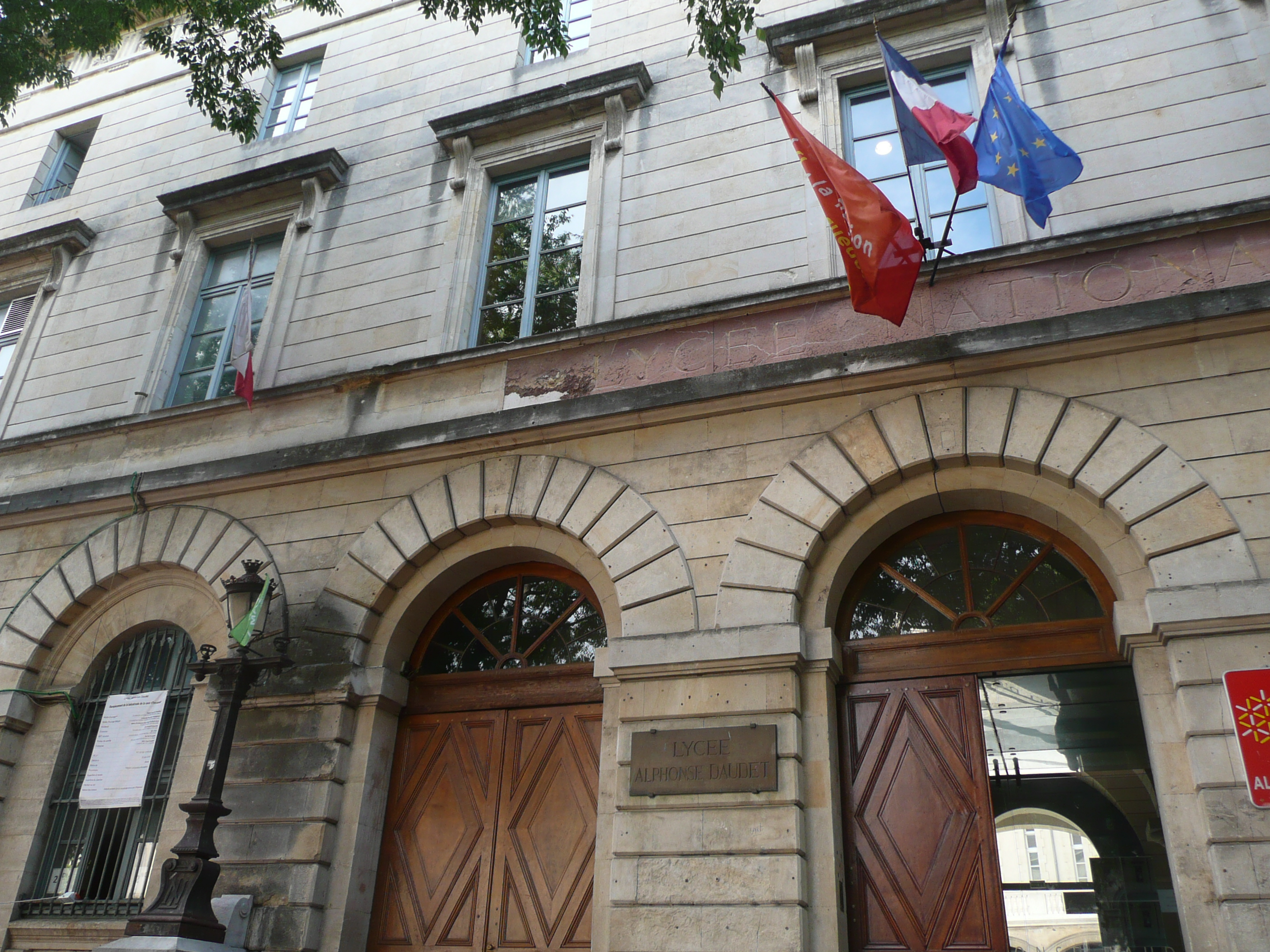 vchod do Lycée